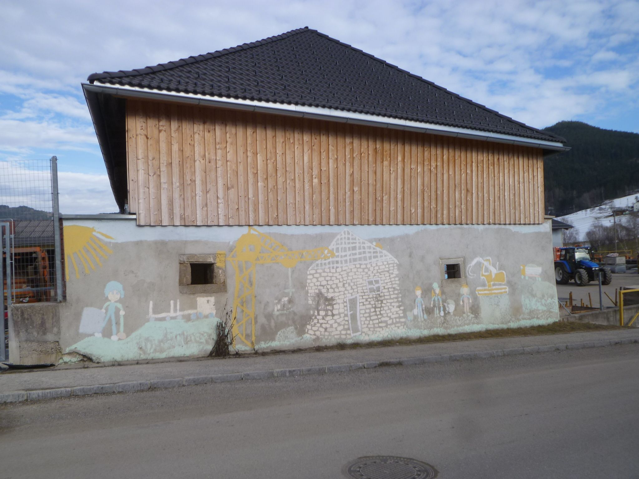 Rest des Meierhofs von Schloss Wartberg